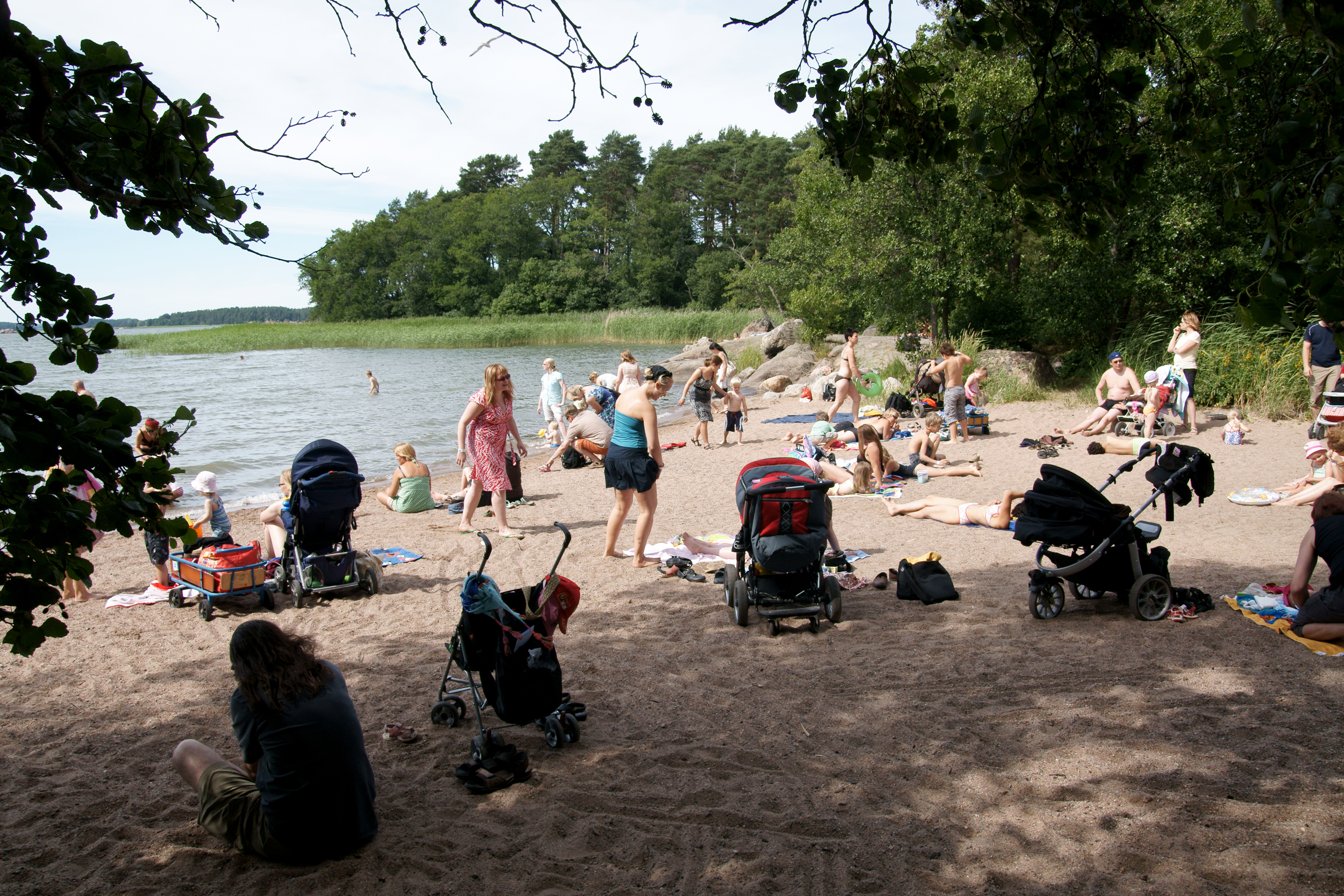 Kailon uimaranta, lähellä Muumimaailmaa.